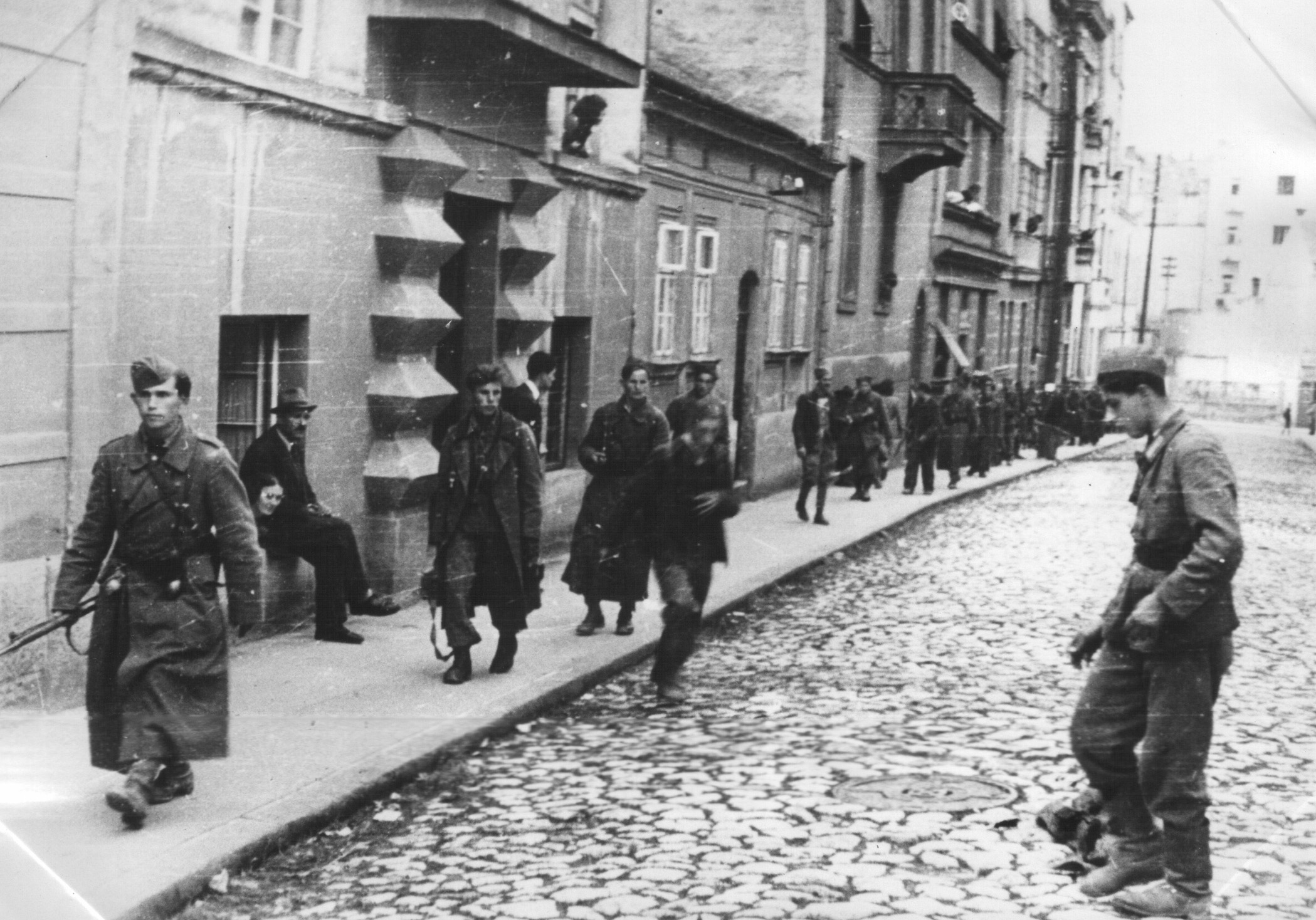 Srpskohrvatski / српскохрватски: Partizani u Beogradu oktobra 1944.